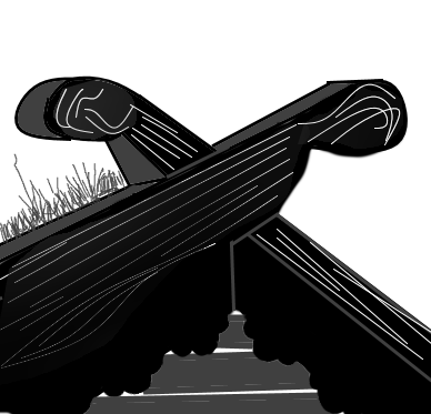 Dévoration de pignon, panneau d'affichage et abri bus en Norvège